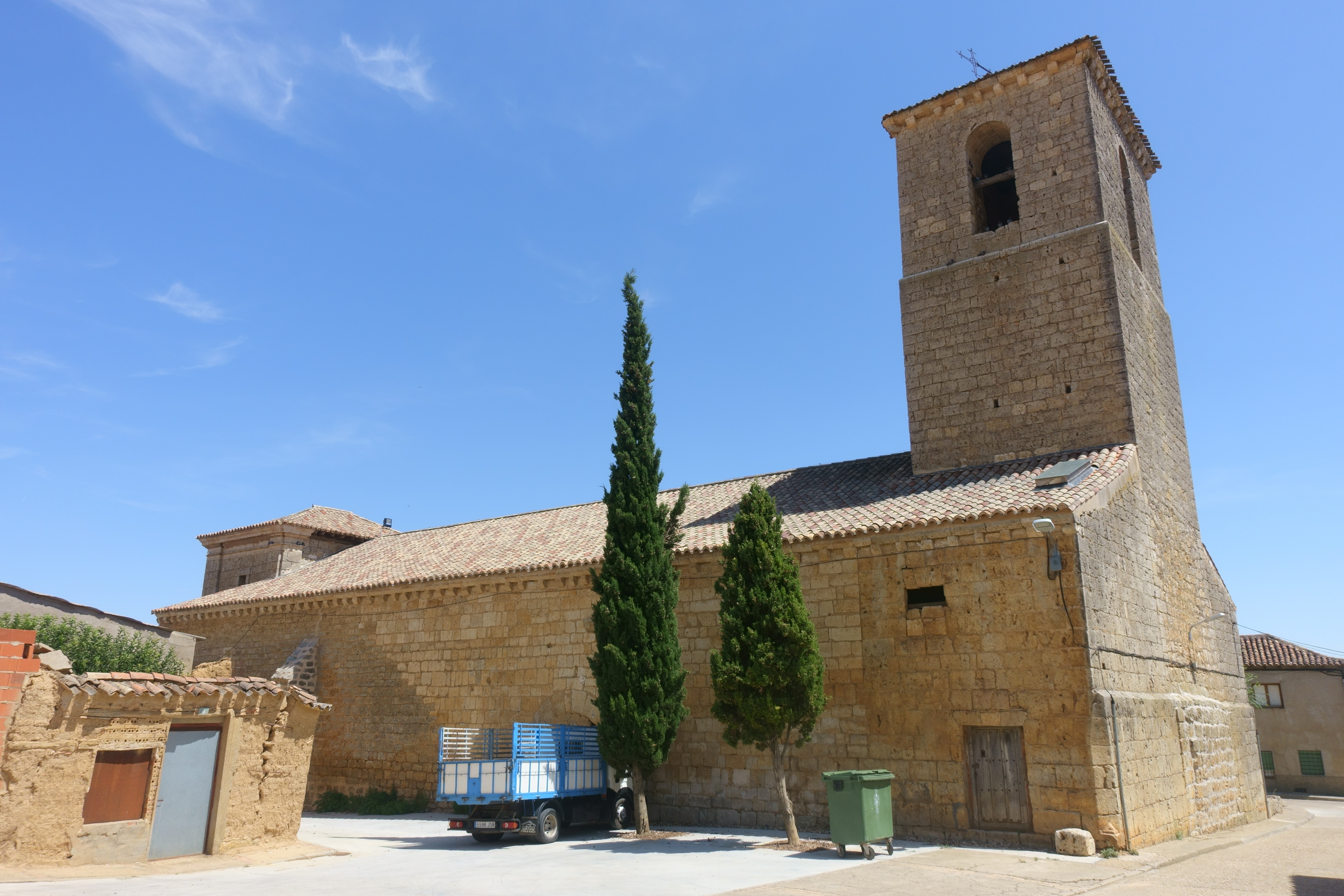 Iglesia de Santiago, Tordehumos (Valladolid, España).